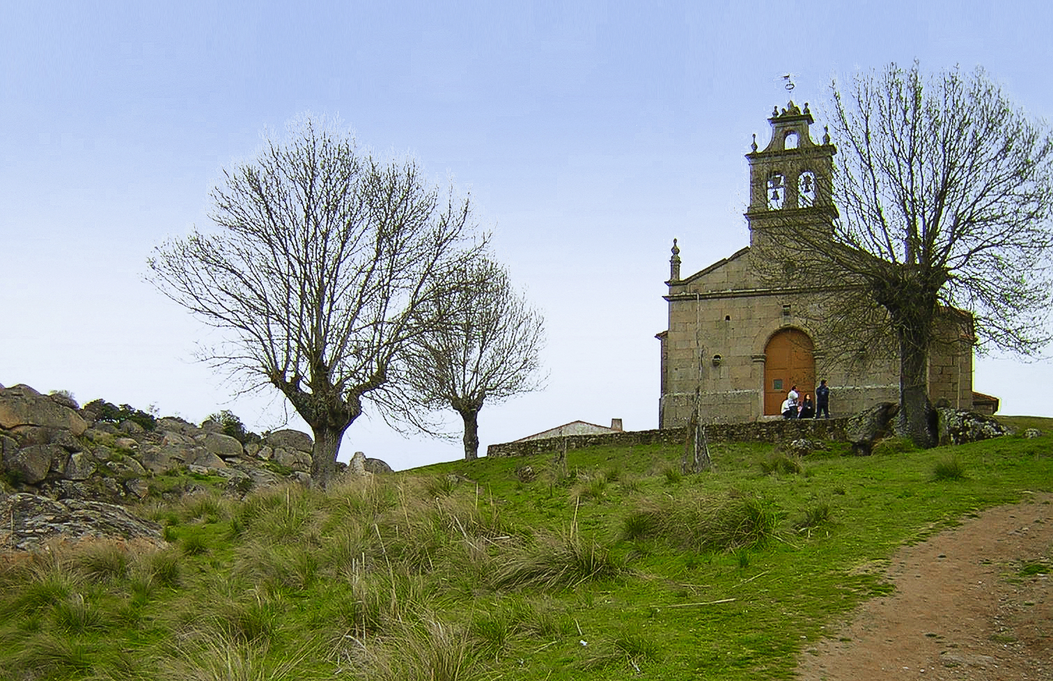 Imagen de la ermita de Pereña de la Ribera (provincia de Salamanca, España) en los Arribes del Duero.